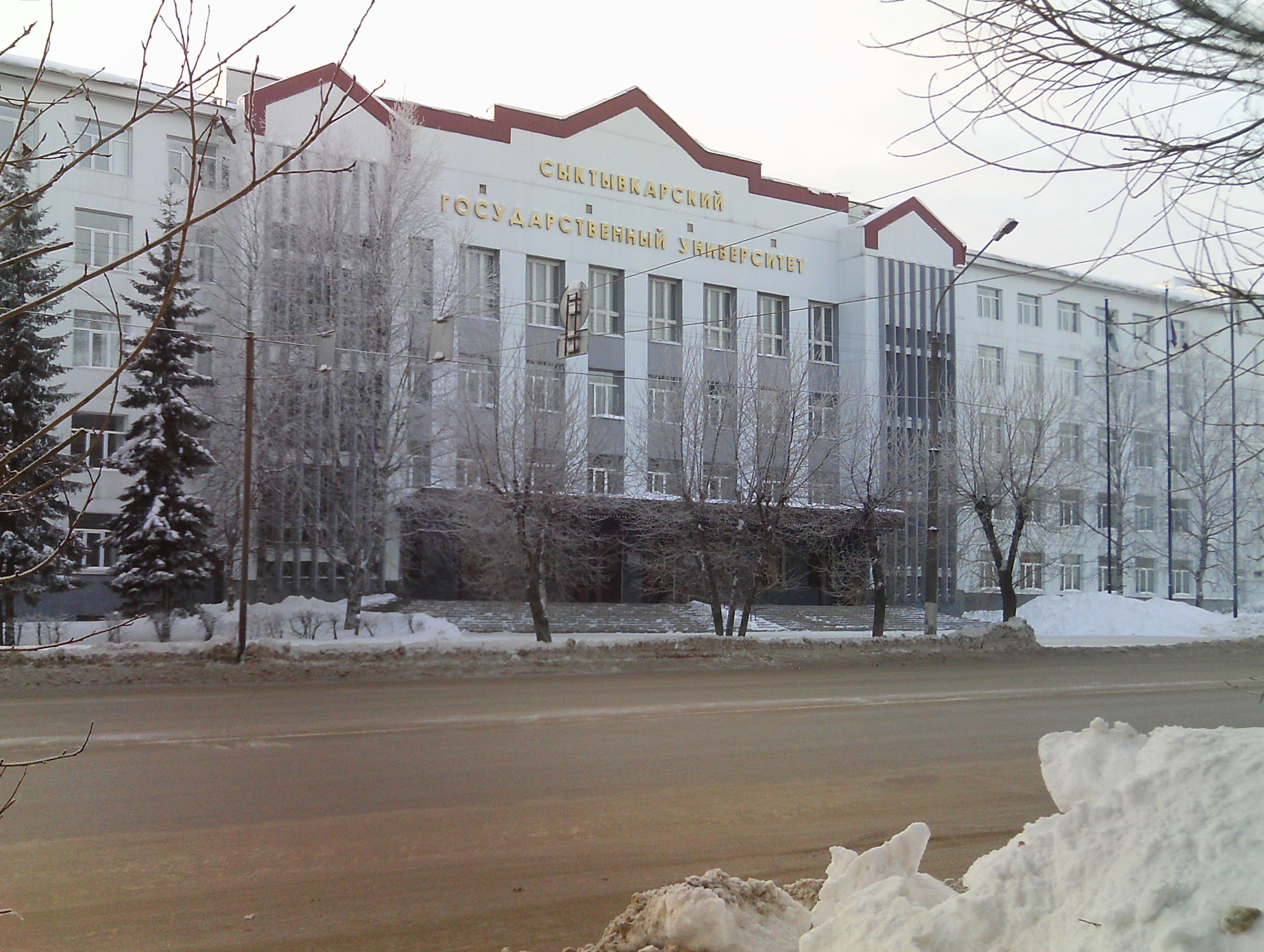 Главный корпус СыктГУ